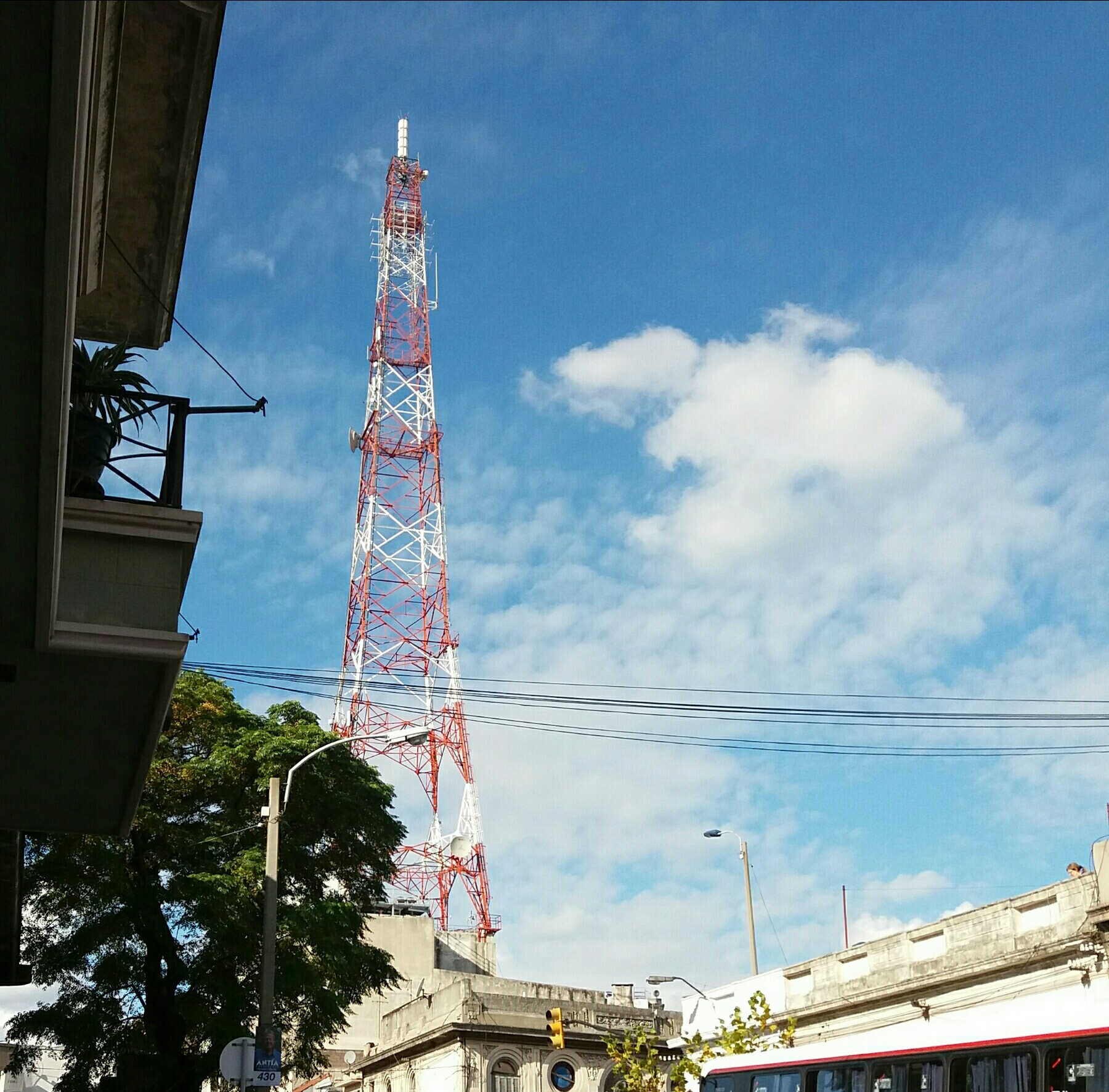 Torre desde donde salen las señales TDT de TNU, ubicada en la sucursal de Antel del barrio Reducto.